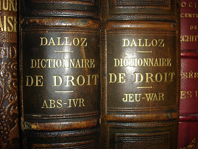 Détail du dos du livre Dictionnaire de droit de Dalloz, 5e édition commencée par Armand et Victor Dalloz